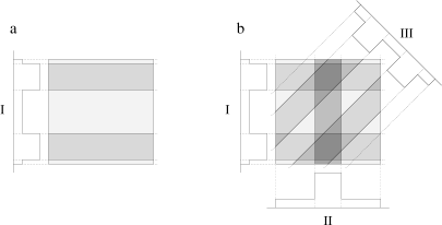 Rekonstrukcija signala pri MRI. Avtor Primož Peterlin. (briši) (tren) 13:05, 10 oktober 2003 . . Peterlin (Pogovor) . . 405x206 (4682 zlogov) (briši) (vrni) 13:05, 10 oktober 2003 . . Peterlin (Pogovor) . . 405x206 (4682 zlogov)